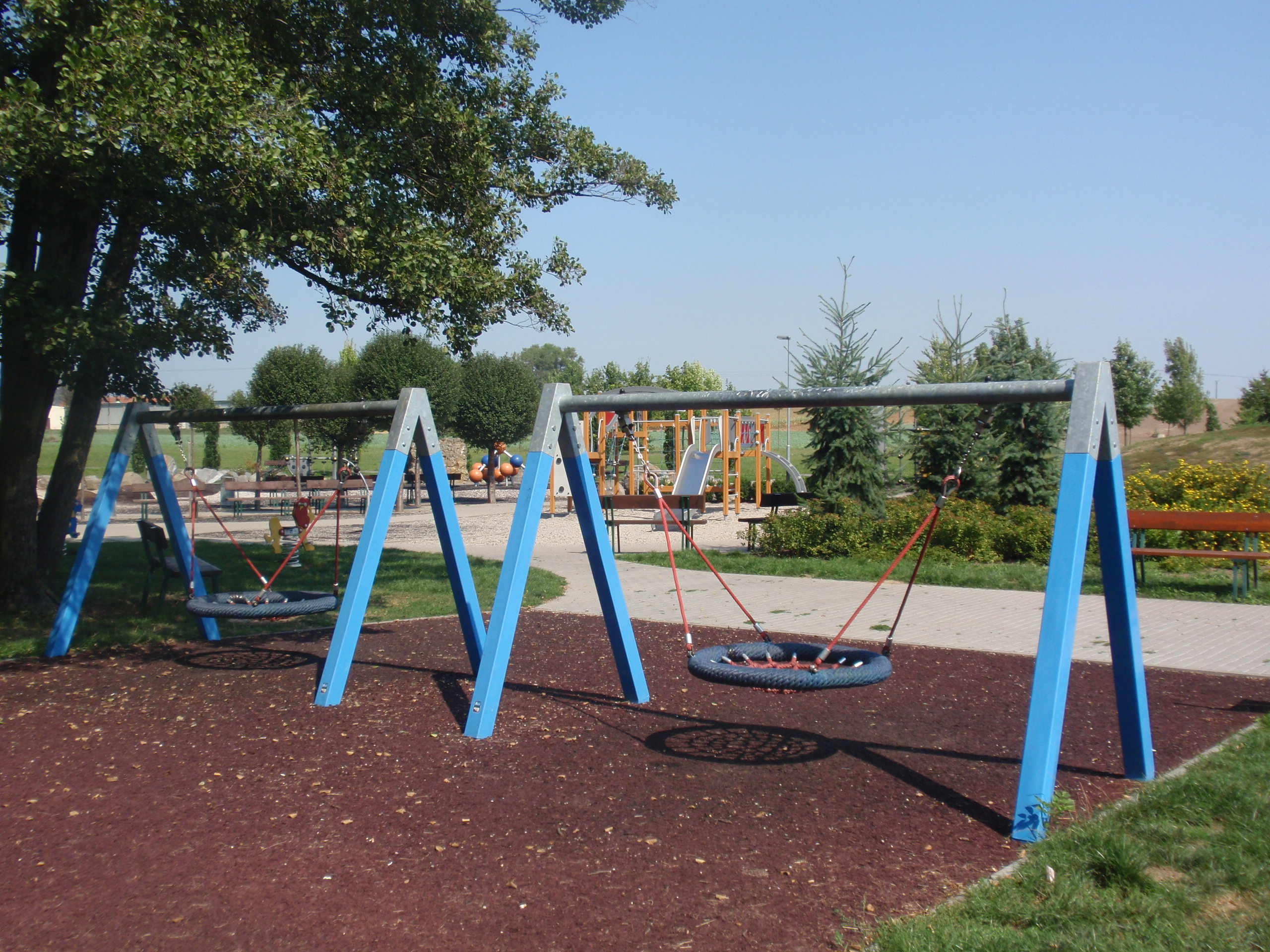 Jahodové hřiště. Dětské hřiště v dědickém parku. Houpačky